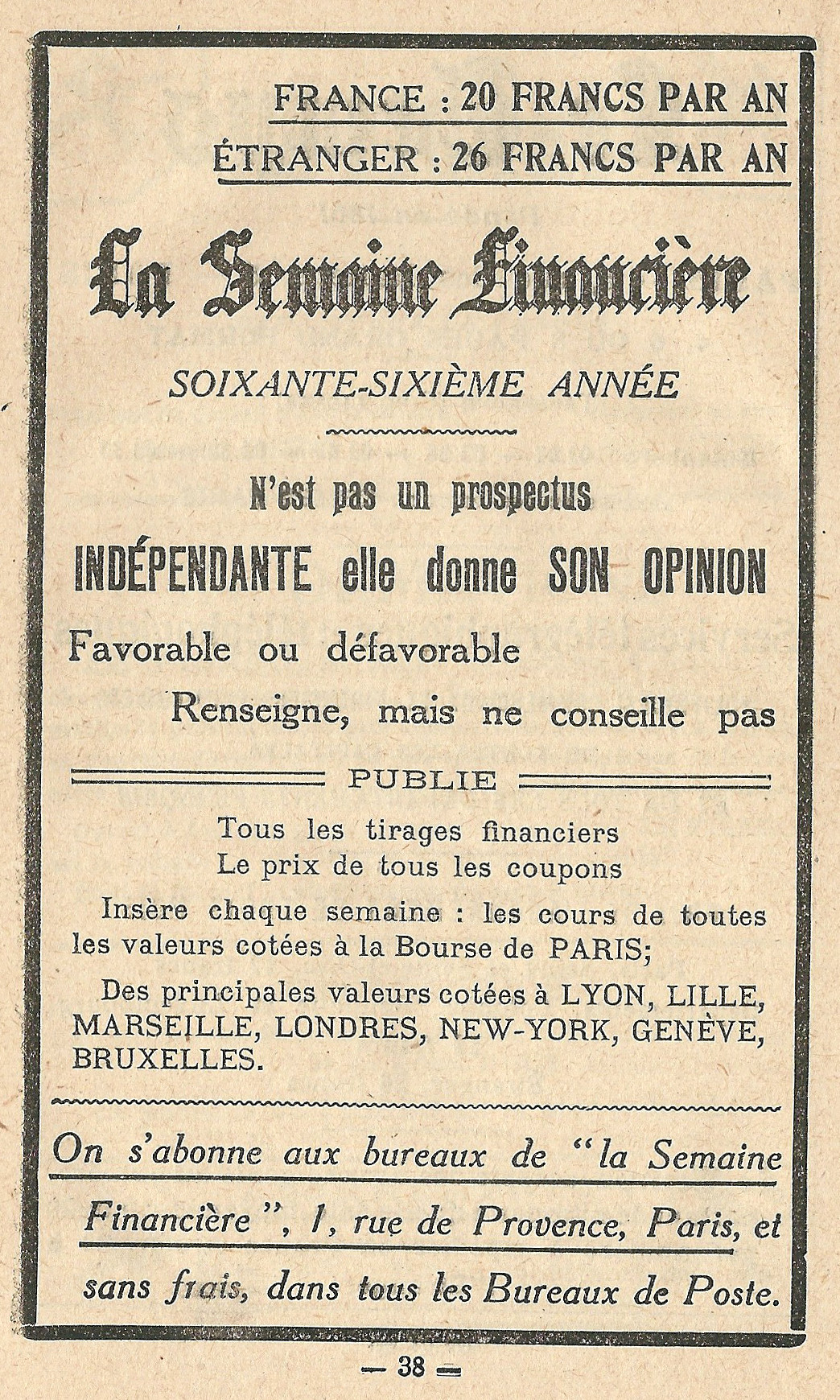 Vignette de réclame pour un journal français : La Semaine Financière